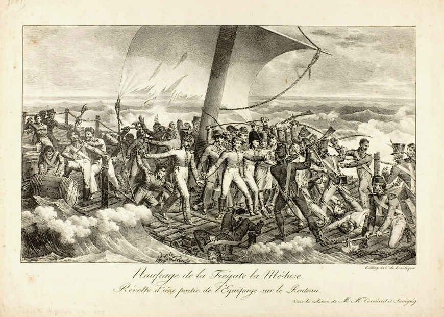 Le Naufrage de la Méduse, 1818, Lithographie de Charles Philibert de Lasteyrie d'après Hippolyte Lecomte. Art Institute of Chicago.